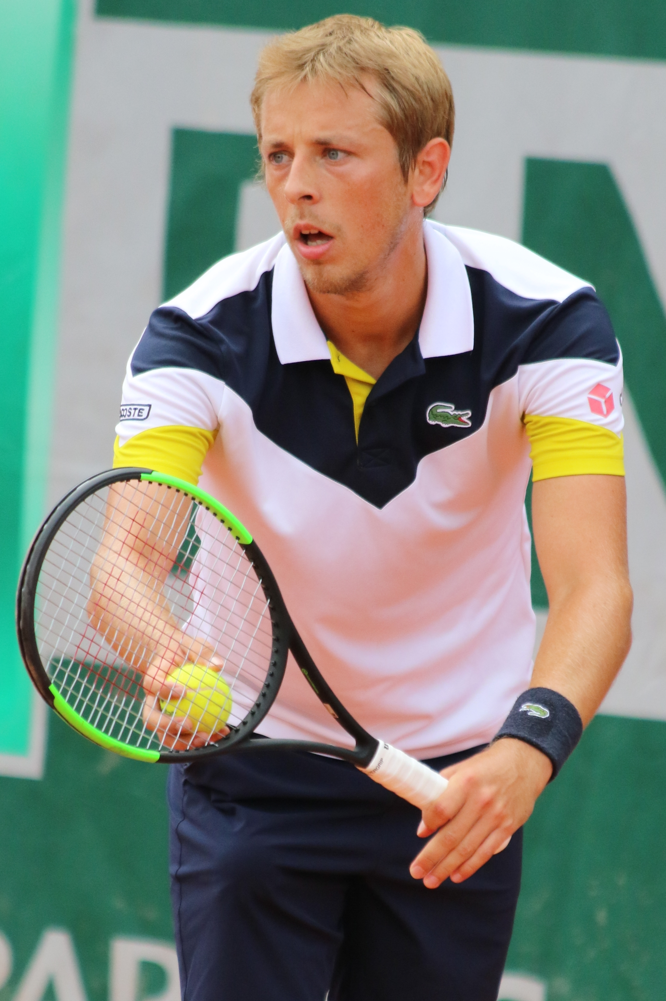 Jacq RG18 (1)